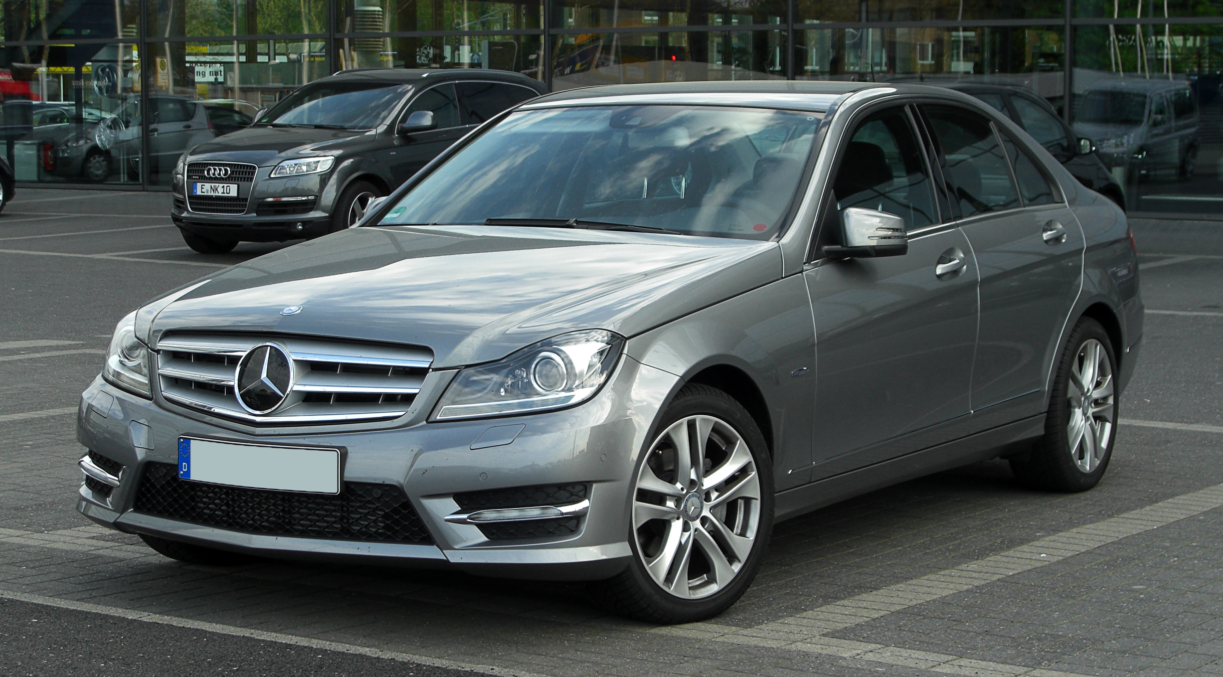 Mercedes-Benz C 220 CDI BlueEFFICIENCY Avantgarde (W 204, Facelift)